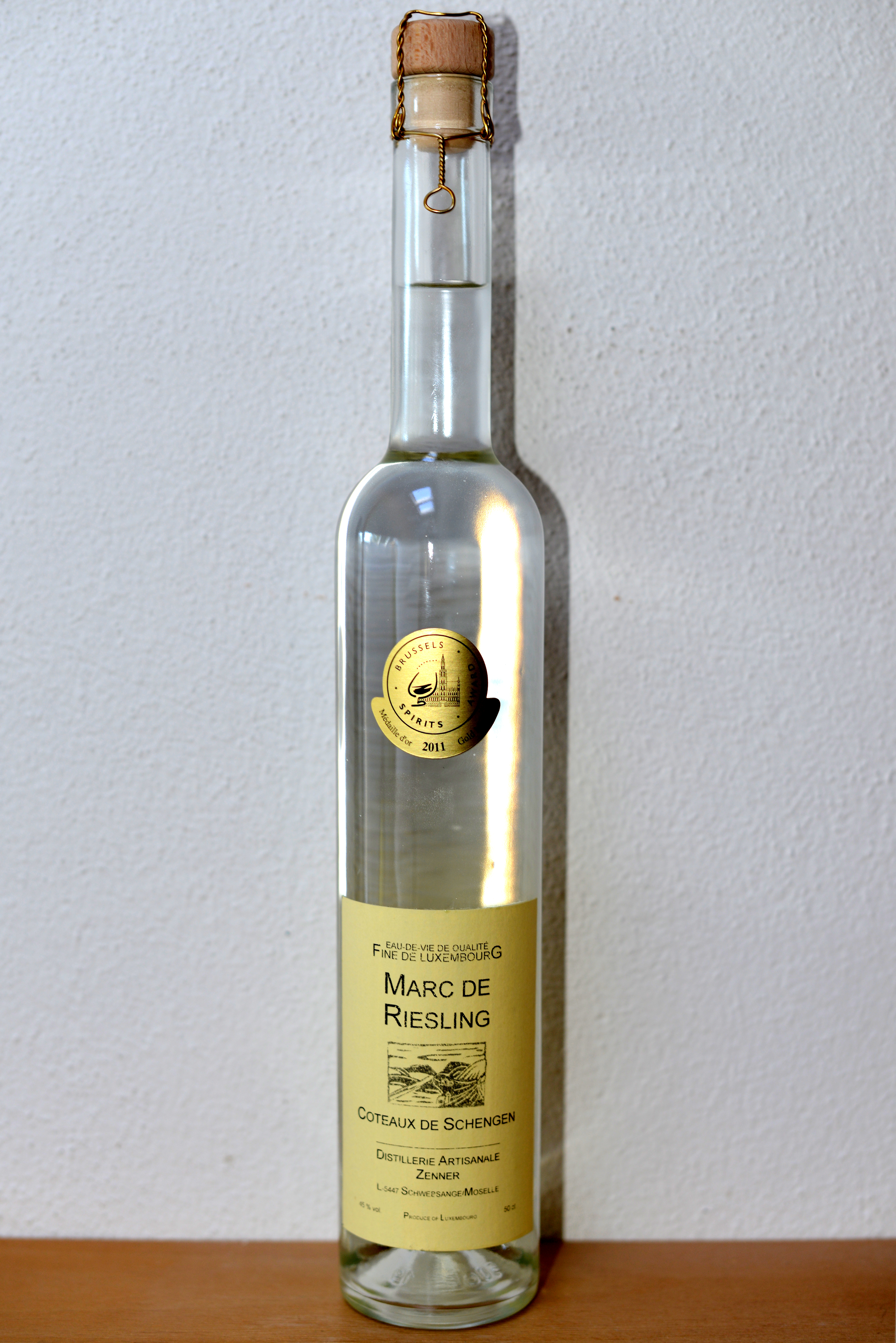 E Marc de Riesling, Trester-Branntewäin vu Schwéidsbengen.